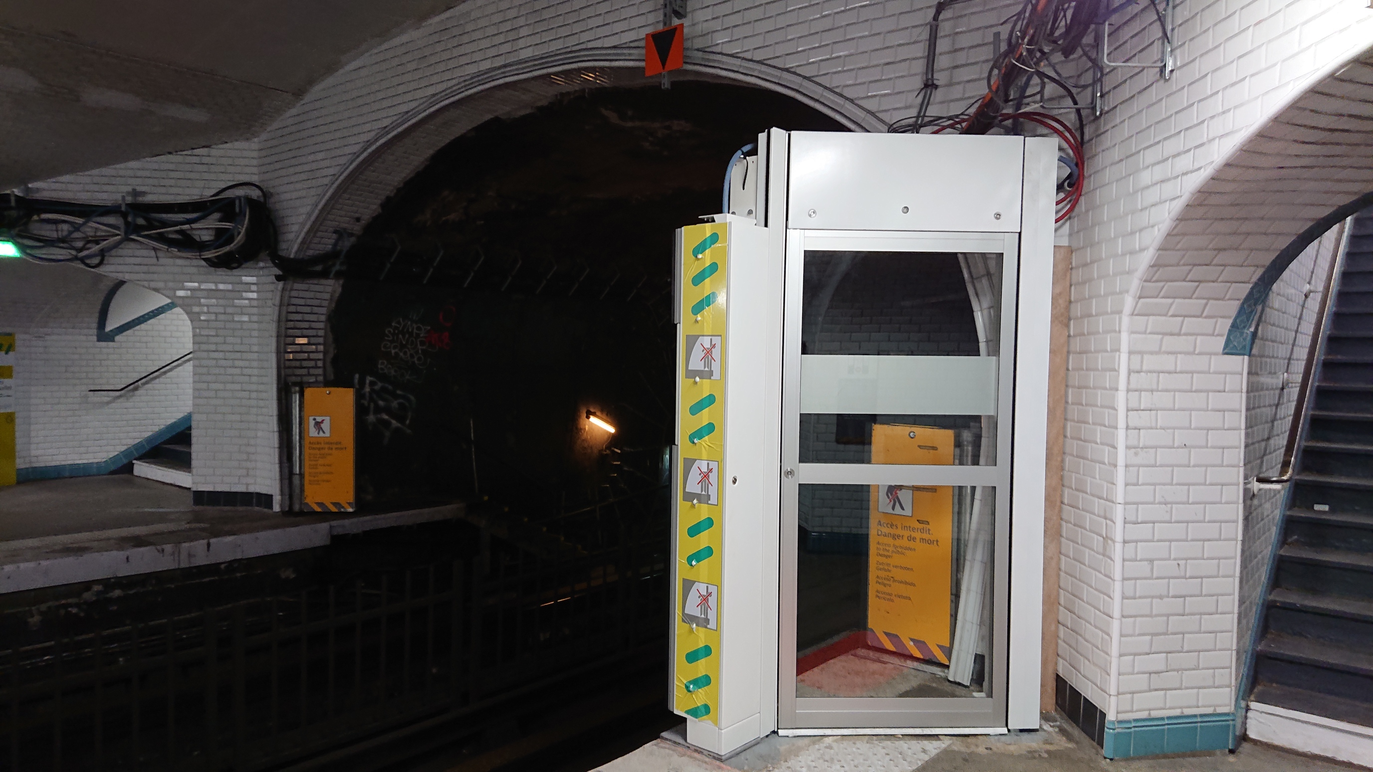 Premiers éléments de porte palière à Mouton-Duvernet